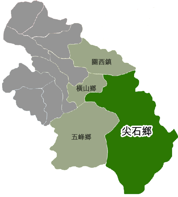 尖石鄉相對位置。